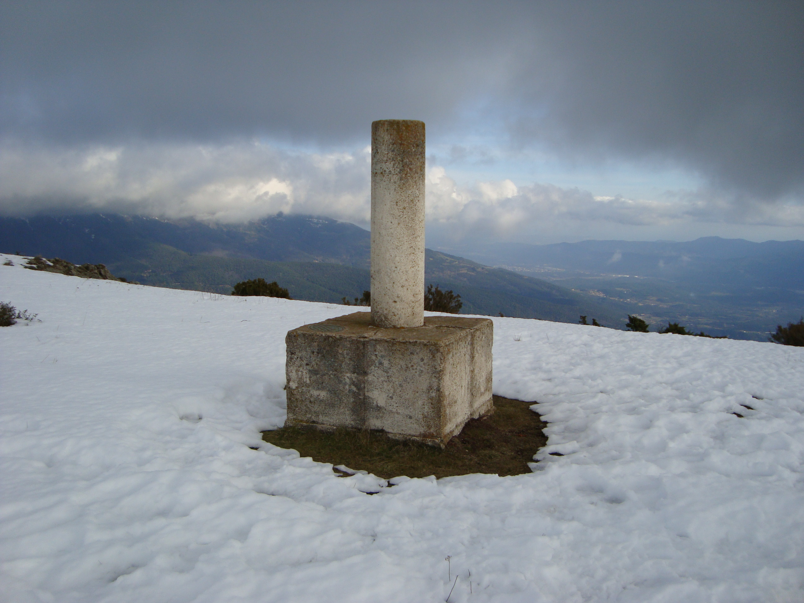 Vèrtex geodèssic del Samont